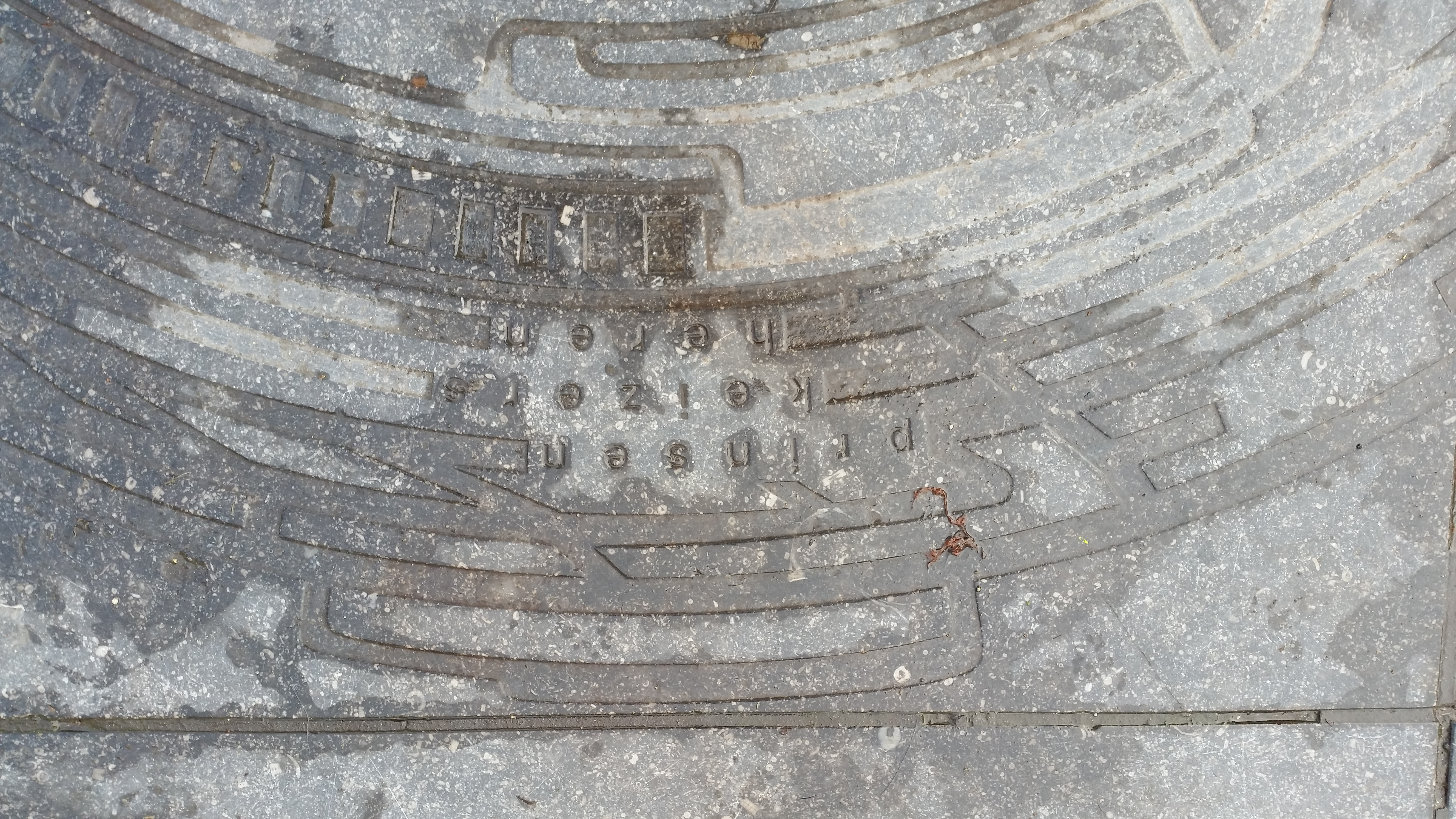 Pagaai (2006), een tweedelig kunstwerk liggende op de Sint Anthoniesluis in Amsterdam-Centrum, maker Christoph Fink